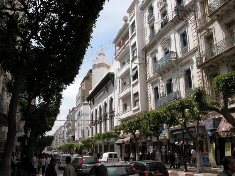 Vue de la rue Larbi Ben M'hidi (anciennement rue d'Isly), à Alger.